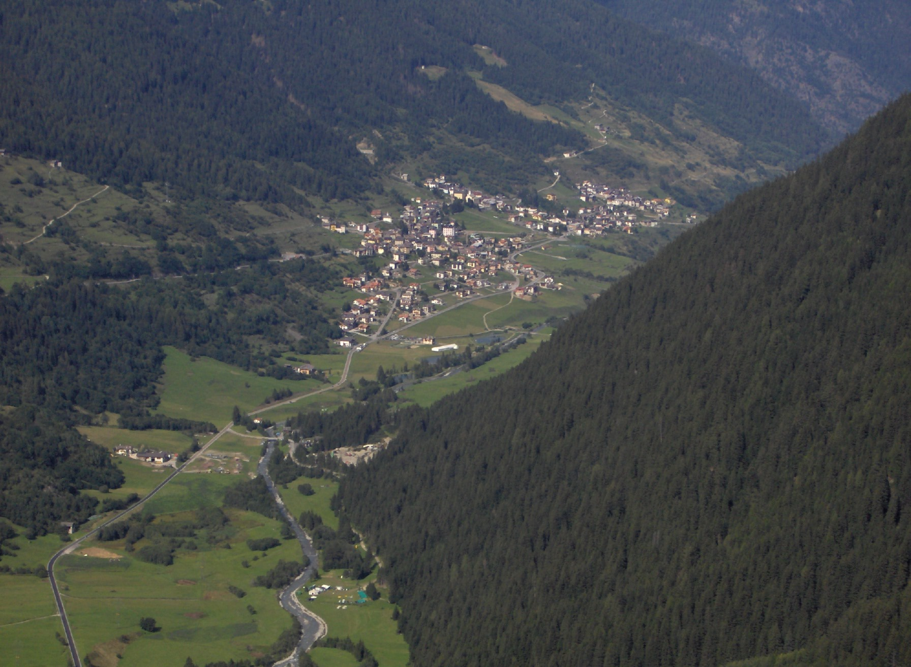 Alfredo Bertolini, foto del paese di Vermiglio dal sentiero del rifugio Denza, estate 2006